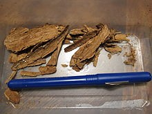 עץ איבוגה